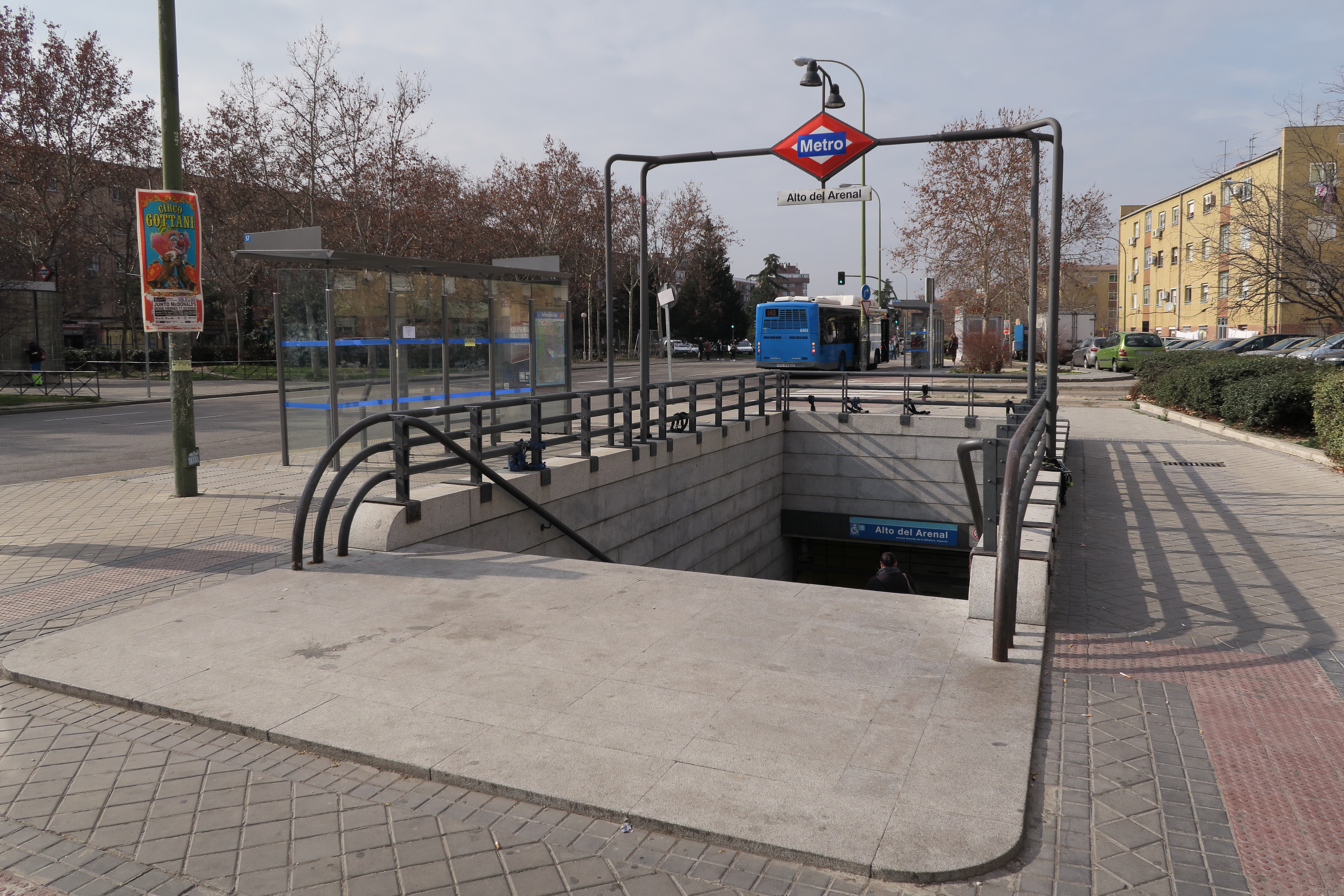 Estación de Alto del Arenal